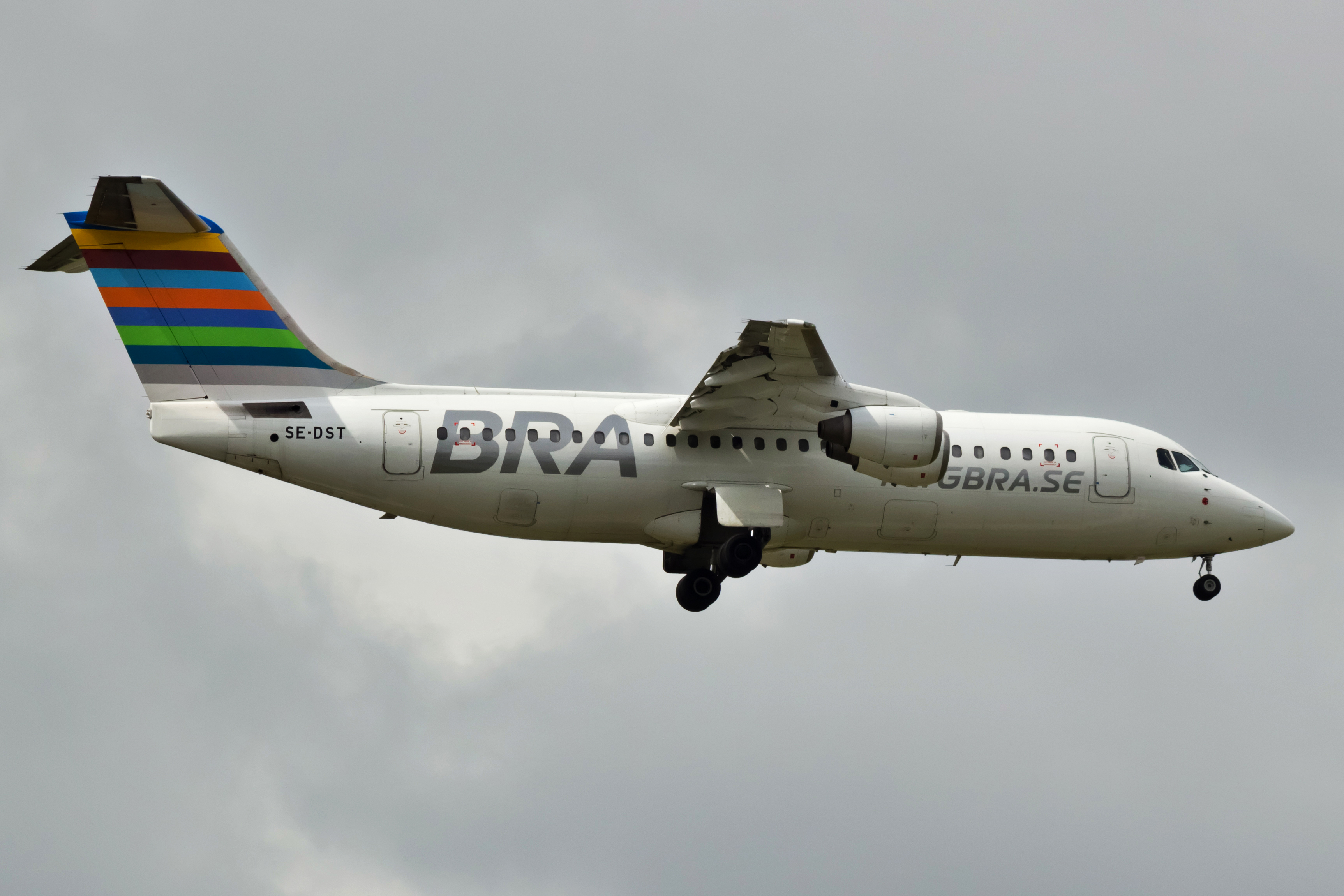 Avro RJ100 de BRA aterrando no aeroporto de Visby.